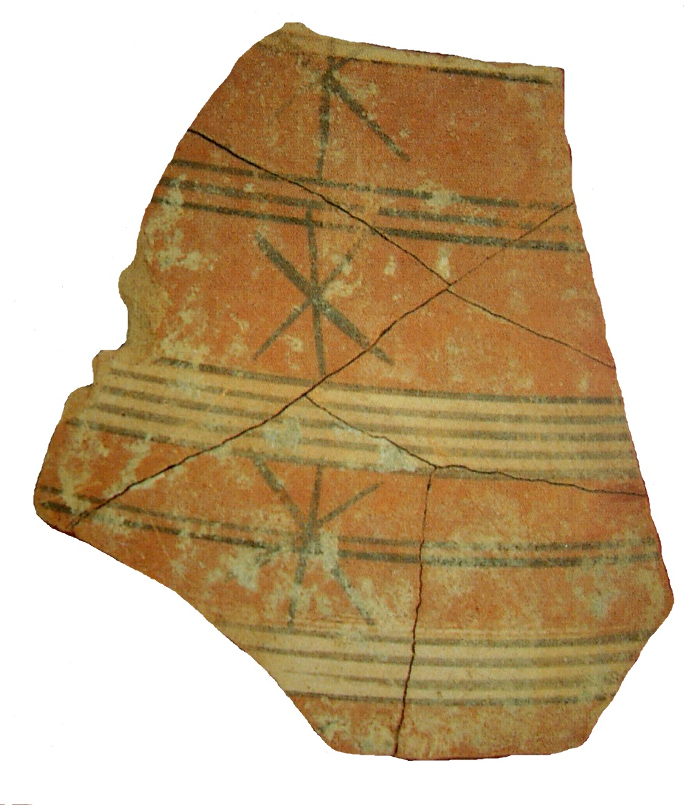 Fragmento de pithoi fenicio. Cerro de la Era